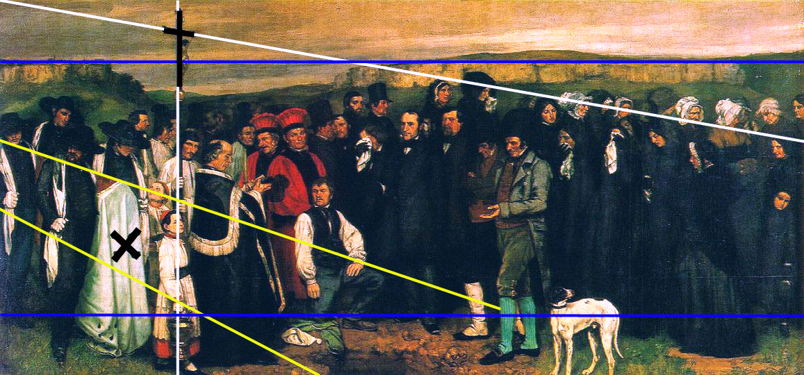 Gustave Courbet, Un enterrement à Ornans, schéma composition.